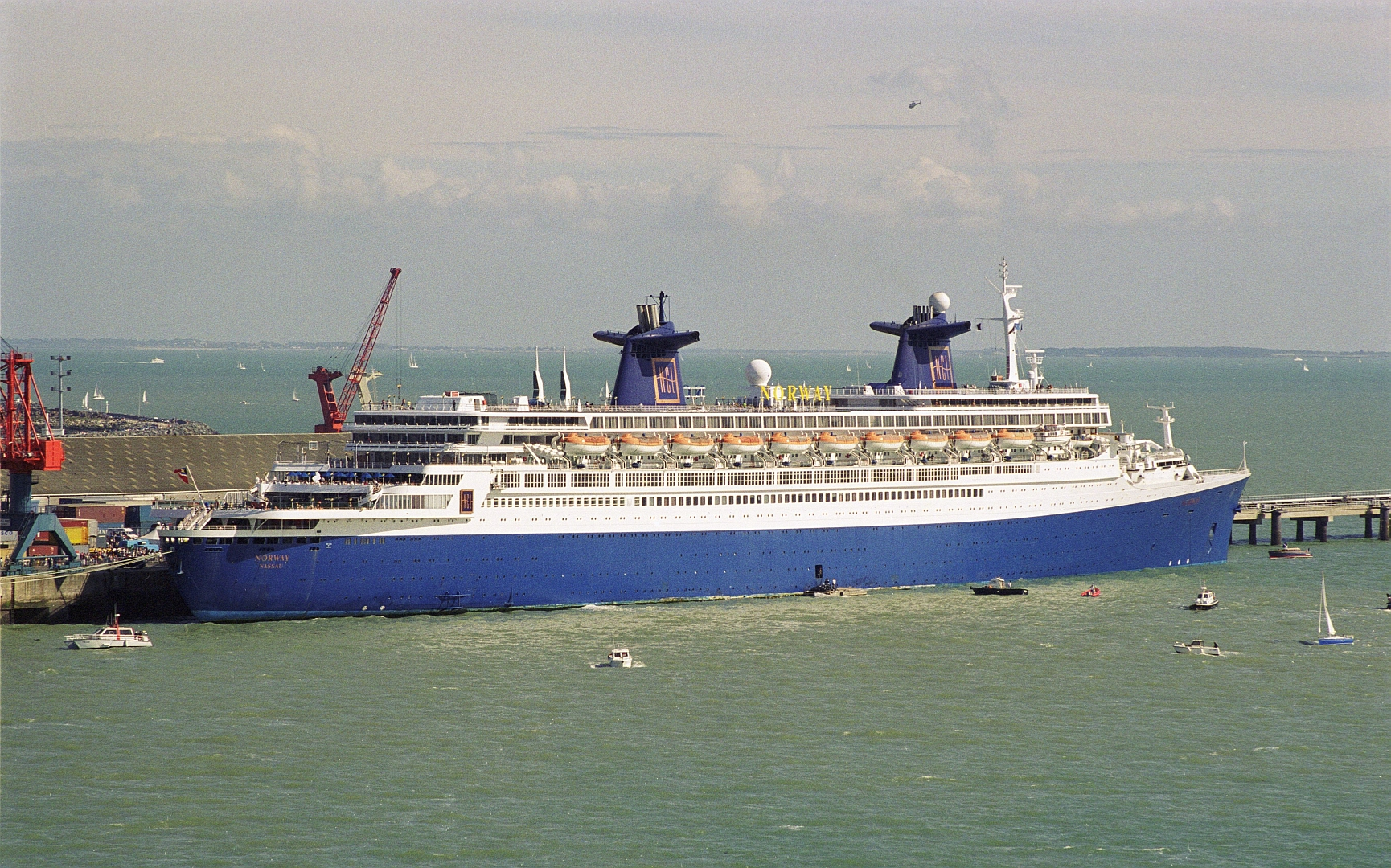 Le Norway vu depuis le pont de l'île de Ré, en escale au port de La Rochelle-Pallice le 31 juillet 1998. IMO Number: 5119143 MMSI Number: Call sign: Length: 316.00 m Beam: 33.80 m